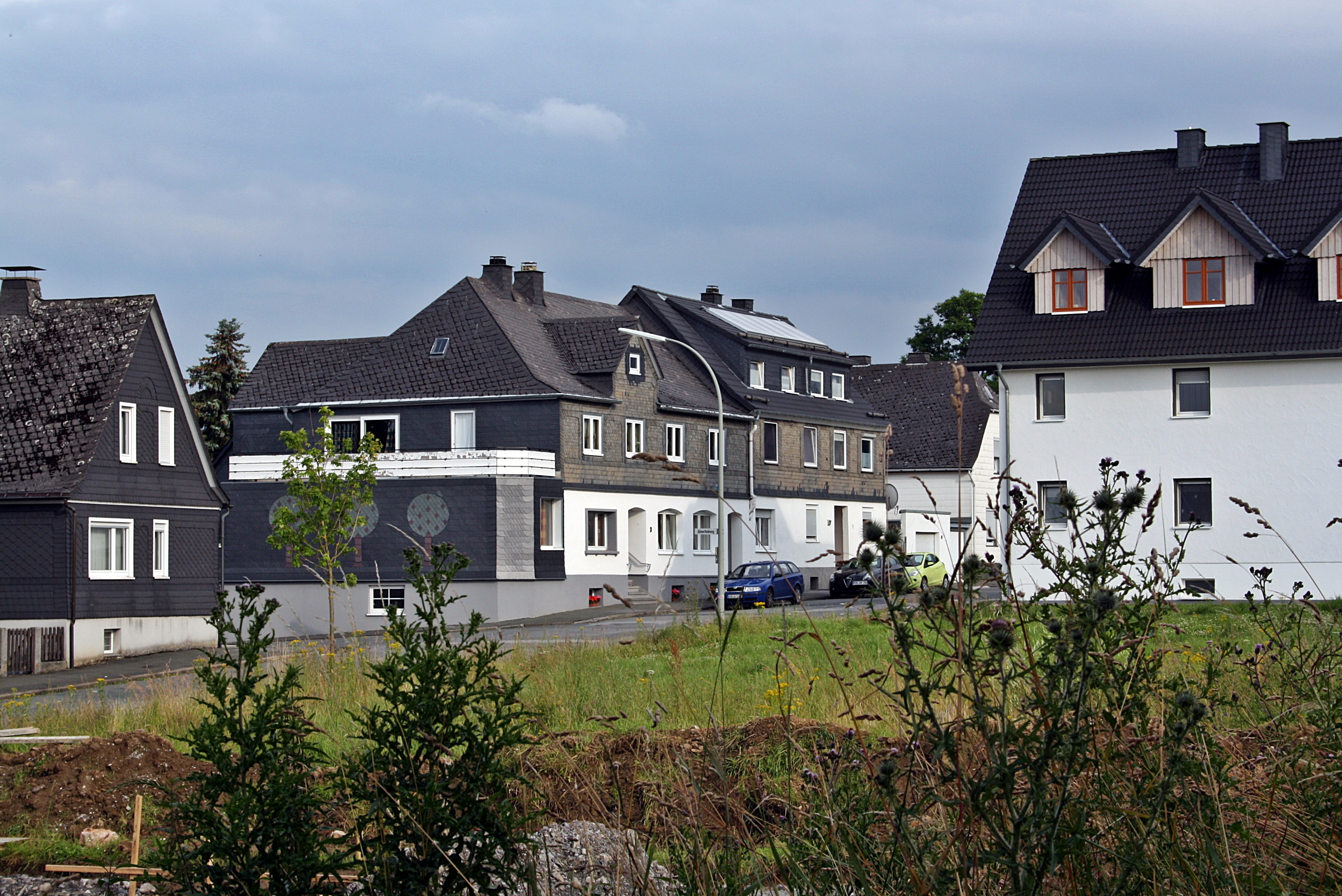 Brilon, Altenbrilon, 2012 4